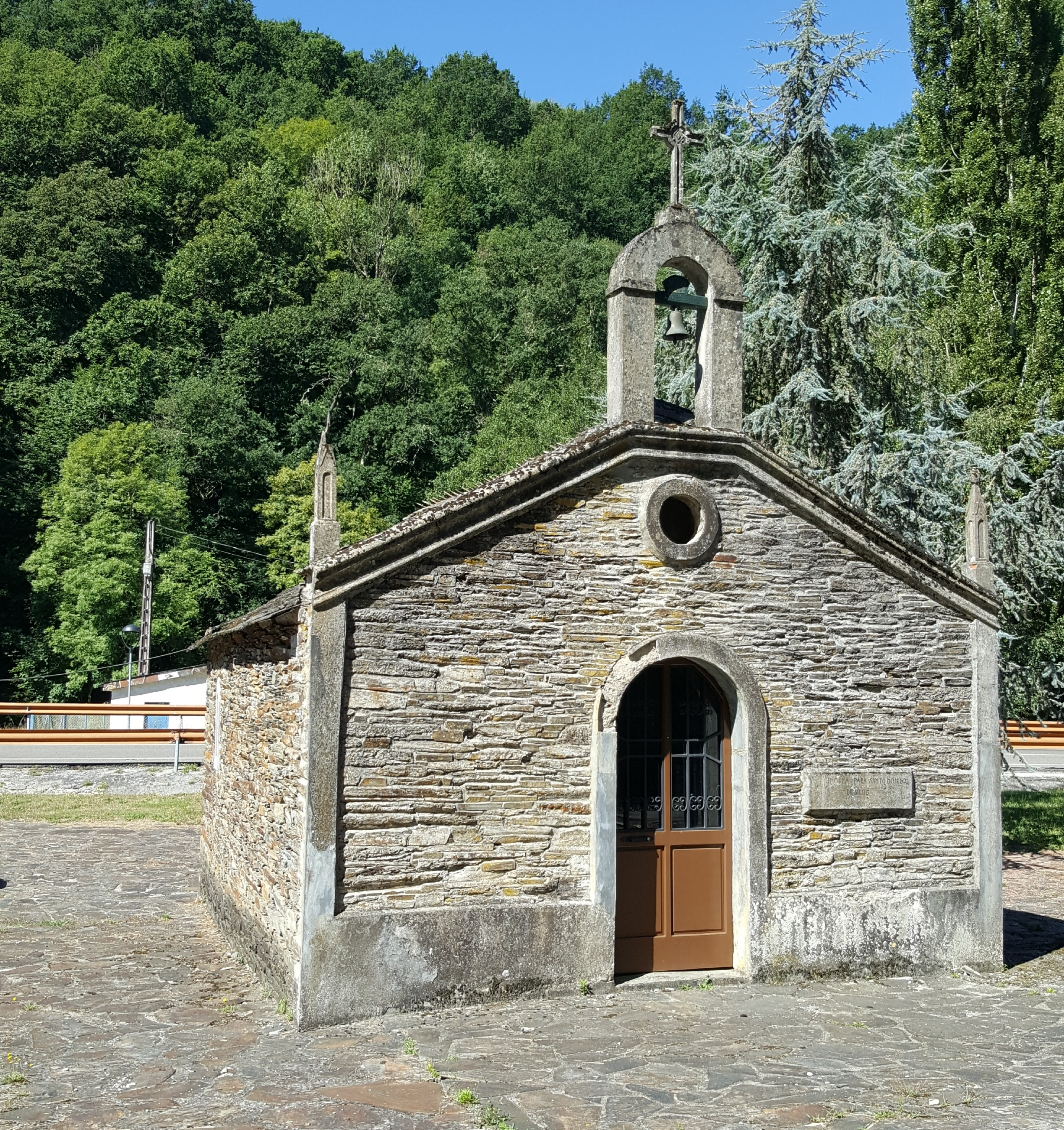 Capela de Teuguín (Samos)